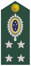 Vertical version of File:General do Exército.gif